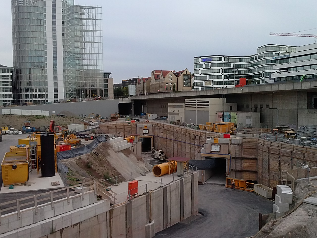 Tunnel für die Stadtbahn U12 im Europaviertel Stuttgart, Landesbank Baden-Württemberg im Hintergrund